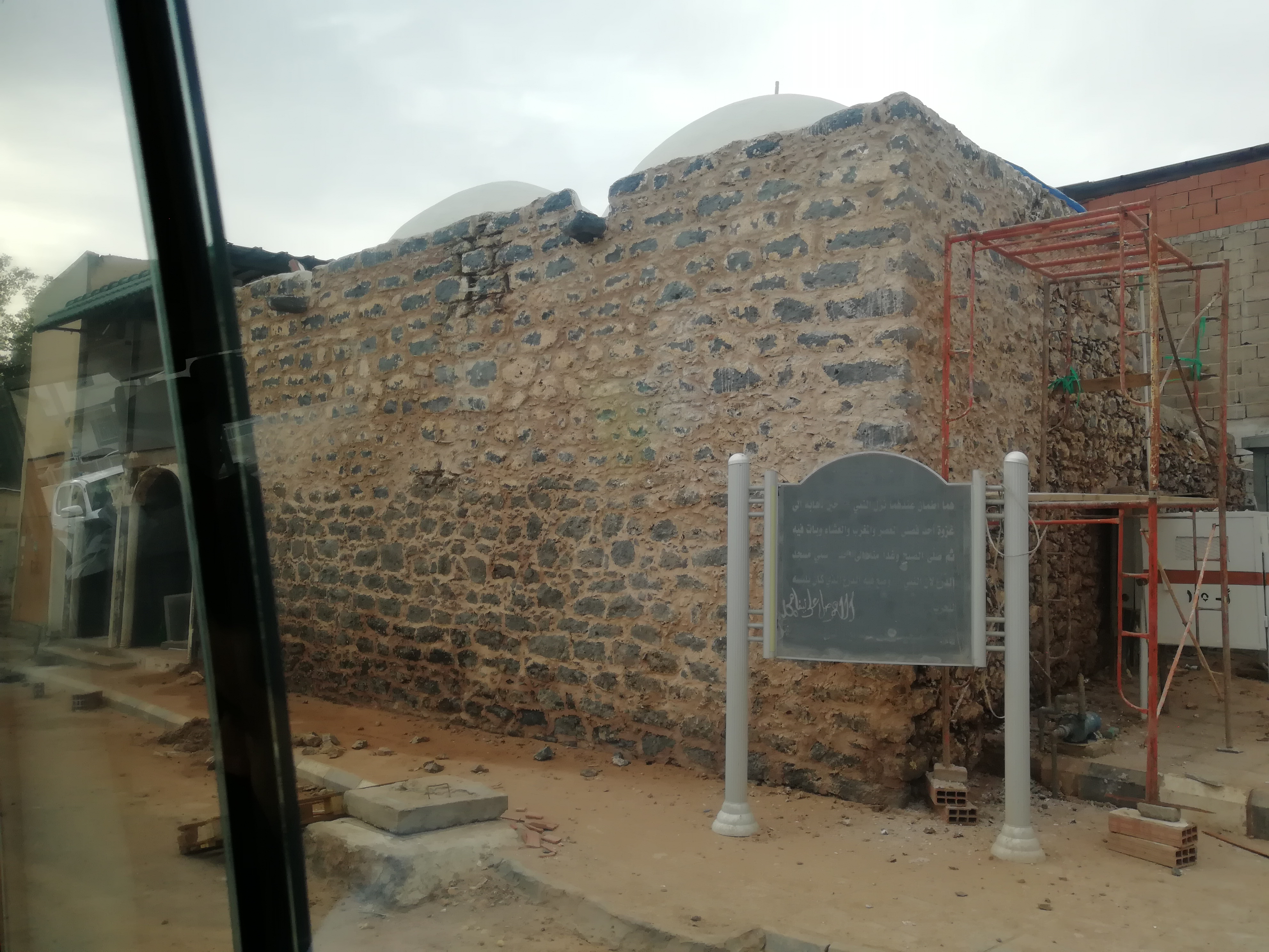 al-Madinah al-Munawarah el-Dera' Mosque مسجد الدرع